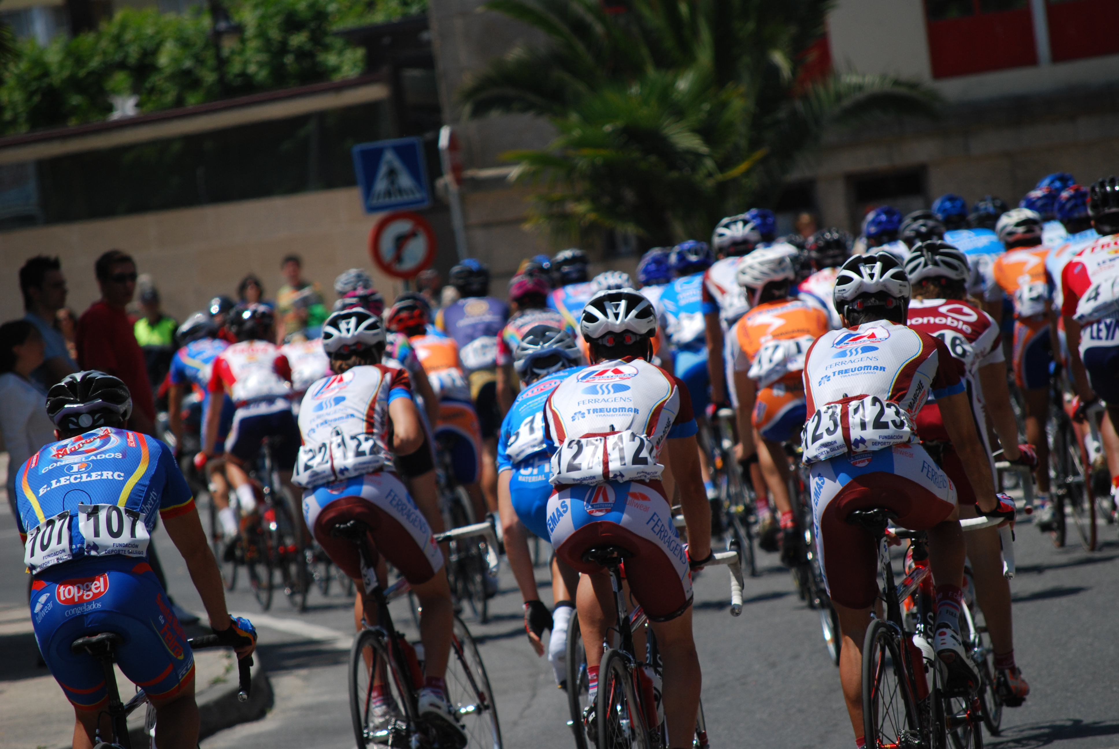 Ciclistas na Volta ciclista a Galicia de 2008 en Cangas.